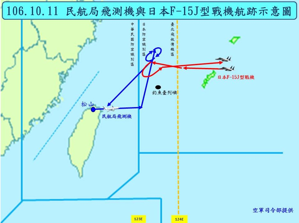 中华民国国防部新闻稿中，与中华民国防空识别区相关的图片。来自中华民国空军司令部（10月18日的消息）。